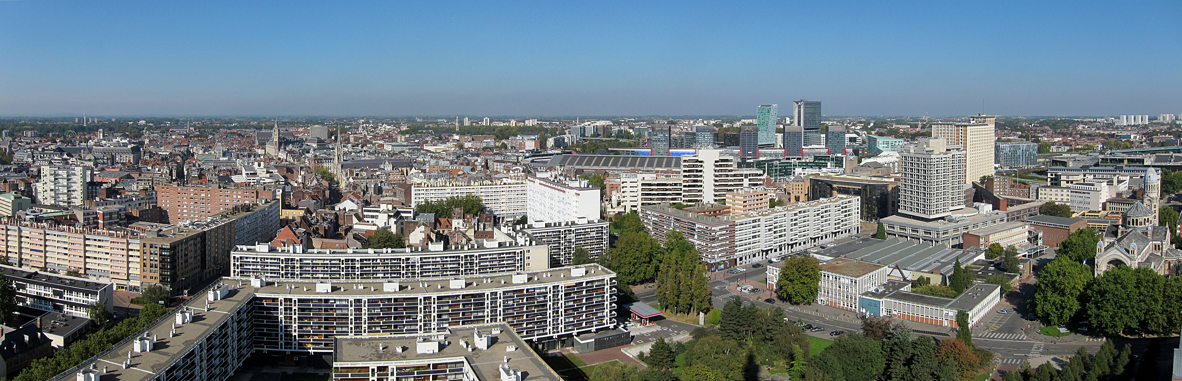 Vue nord de Lille depuis le beffroi de l'hôtel de ville.